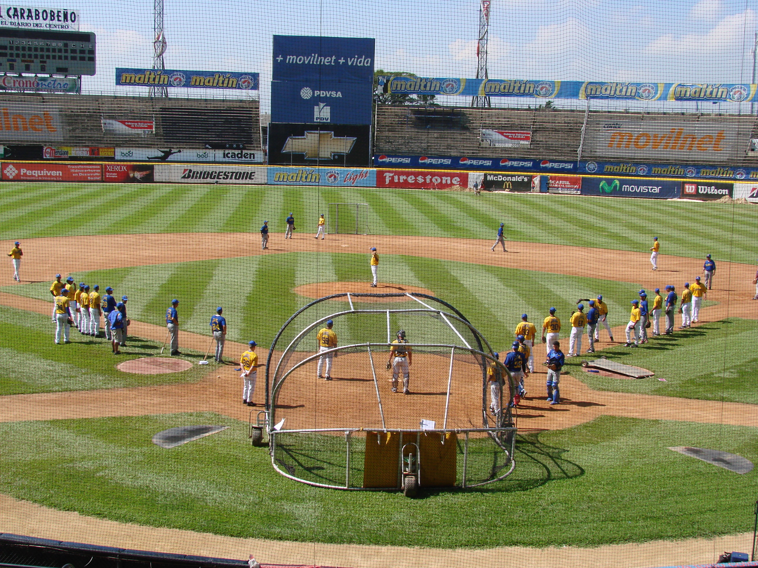 PANORÀMICA INTERNA. Estadium "Josè Bernardo Pèrez". Valencia. Estado Carabobo. Venezuela.